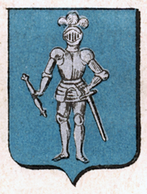 Stemma della Famiglia Valdina